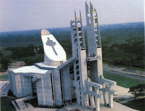 Vista aérea de la Basilica